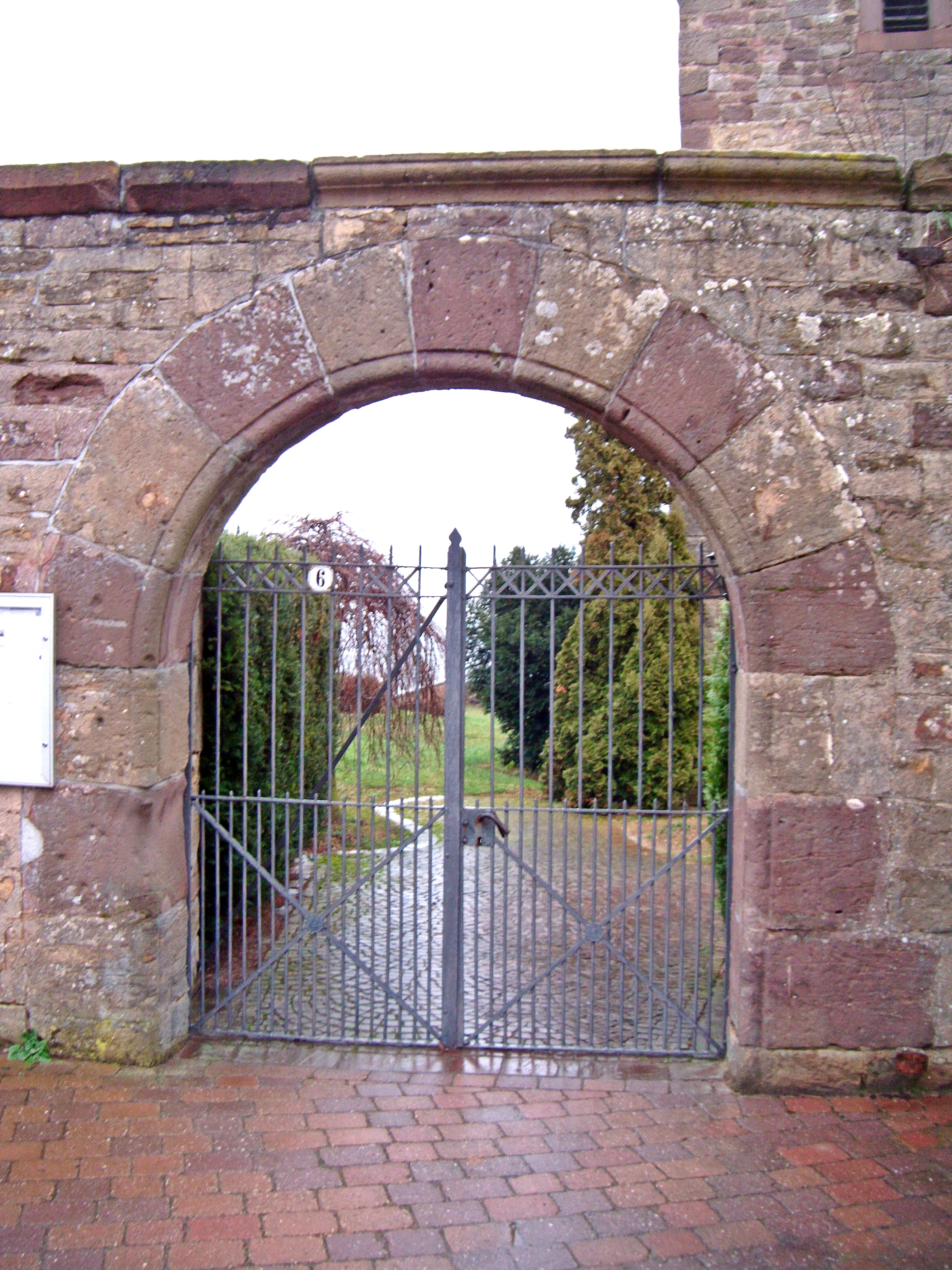 Prot. Martinskirche Battenberg, um 1200, ehemalige Eigenkirche der Abtei Glandern in Lothringen. Romanisches Portal zum Kirchhof